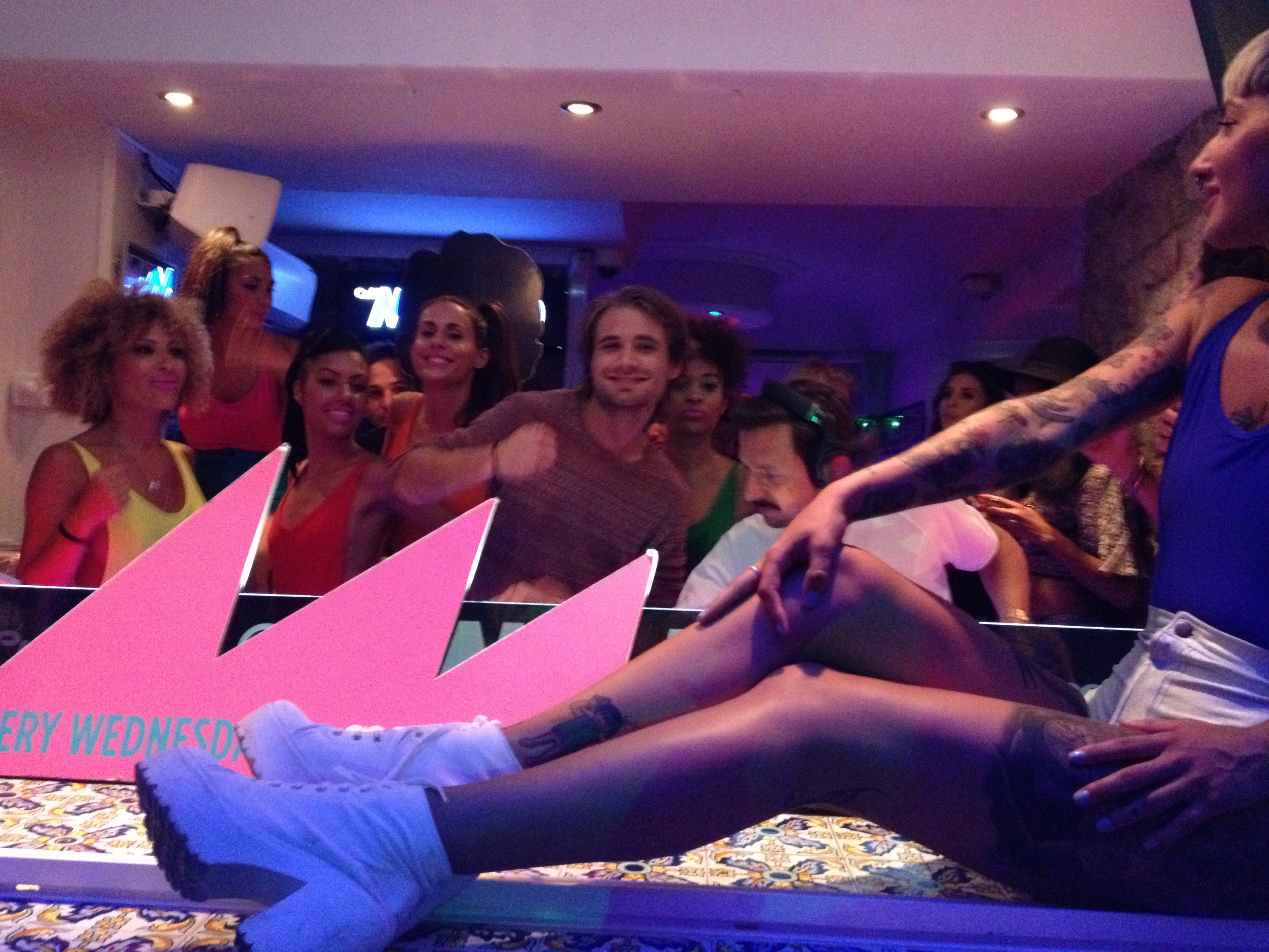 Michael Calfan - Cafe Mambo - Ibiza